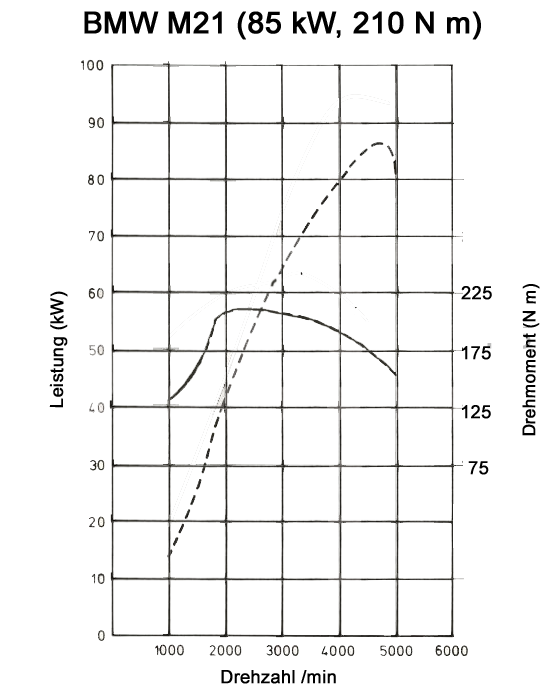 Leistungs- und Drehmomentdiagramm BMW M21